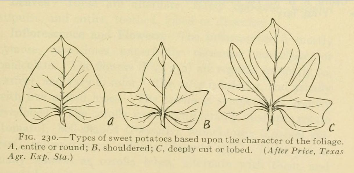 Morphologie des feuilles de Ipomoea batatas, extrait de Wilfred W. Robbins, The botany of crop plants; a text and reference book, Philadelphia, 1917, p. 557.